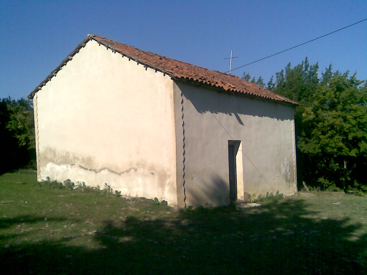 ალის დედაღვთისა